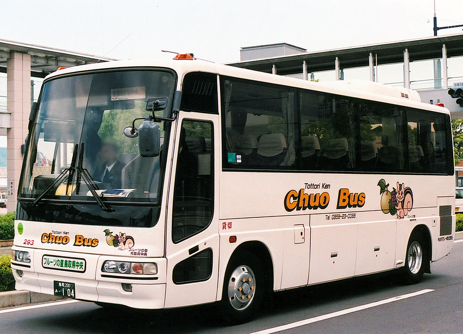 中央タクシー KC-MJ629F改